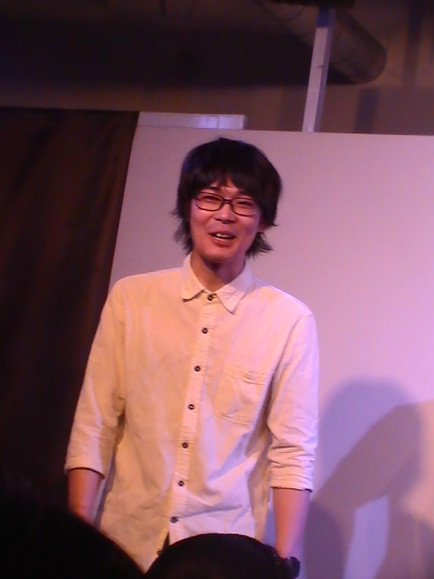 曇天三男坊 (2017年5月21日)